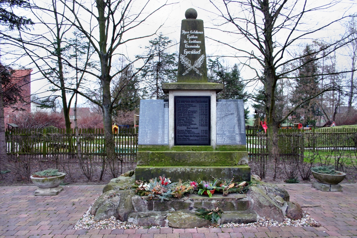 Das Kriegerdenkmal in Horstdorf (Sachsen-Anhalt) mit allen Namen der gefallenen Einwohner des Ortes beider Weltkriege